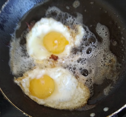 la fritata ovo